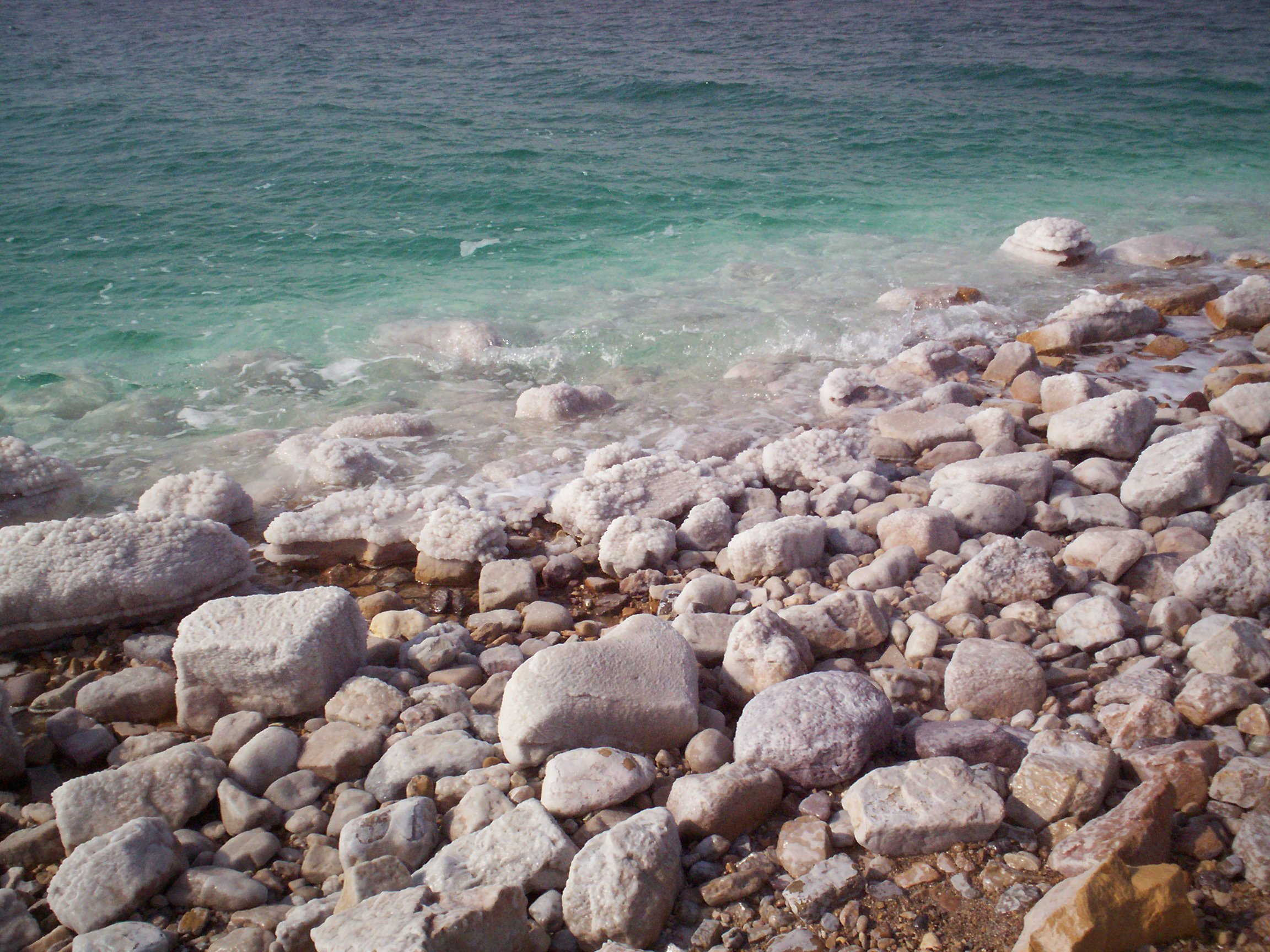 mar morto